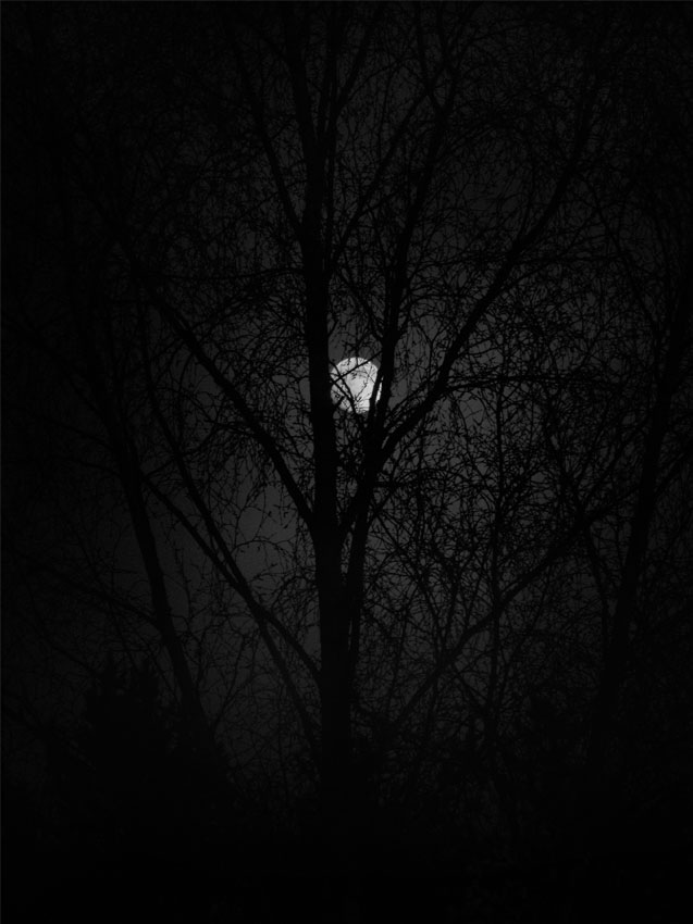 Midnight Mist